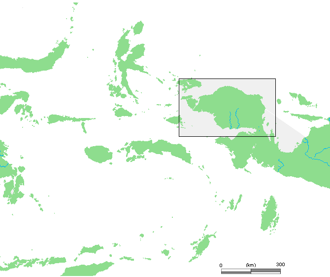 ID Vogelkop.PNG